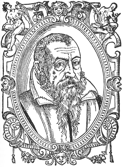 Sujet : Portrait de Daléchamps Source : Gravure du début du XVIIe siècle. Image du domaine public. Artiste : Inconnu.